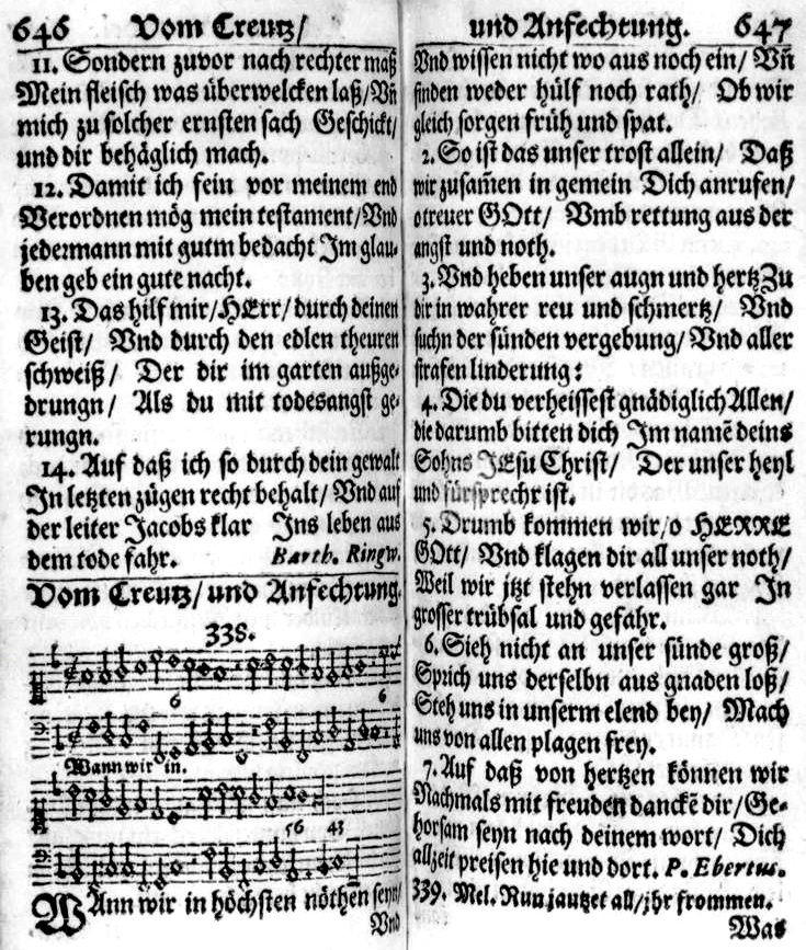 Paul Eber: Wenn wir in höchsten Nöten sein in der Fassung der Praxis Pietatis Melica 1653